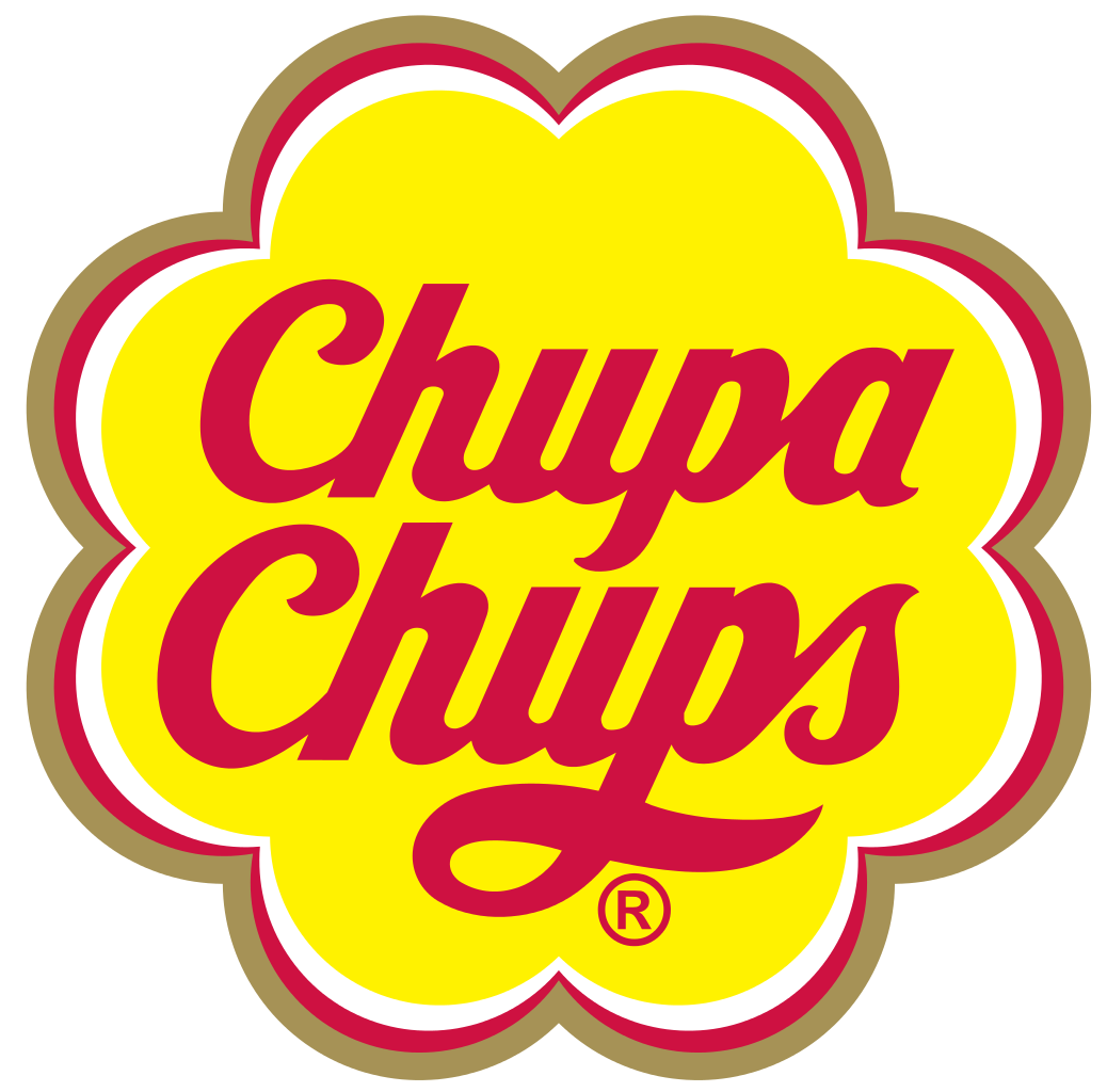 צ'ופה צ'ופס לוגו